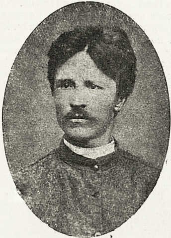 Aleksandr Fëdorovič Medvedev-Fomin